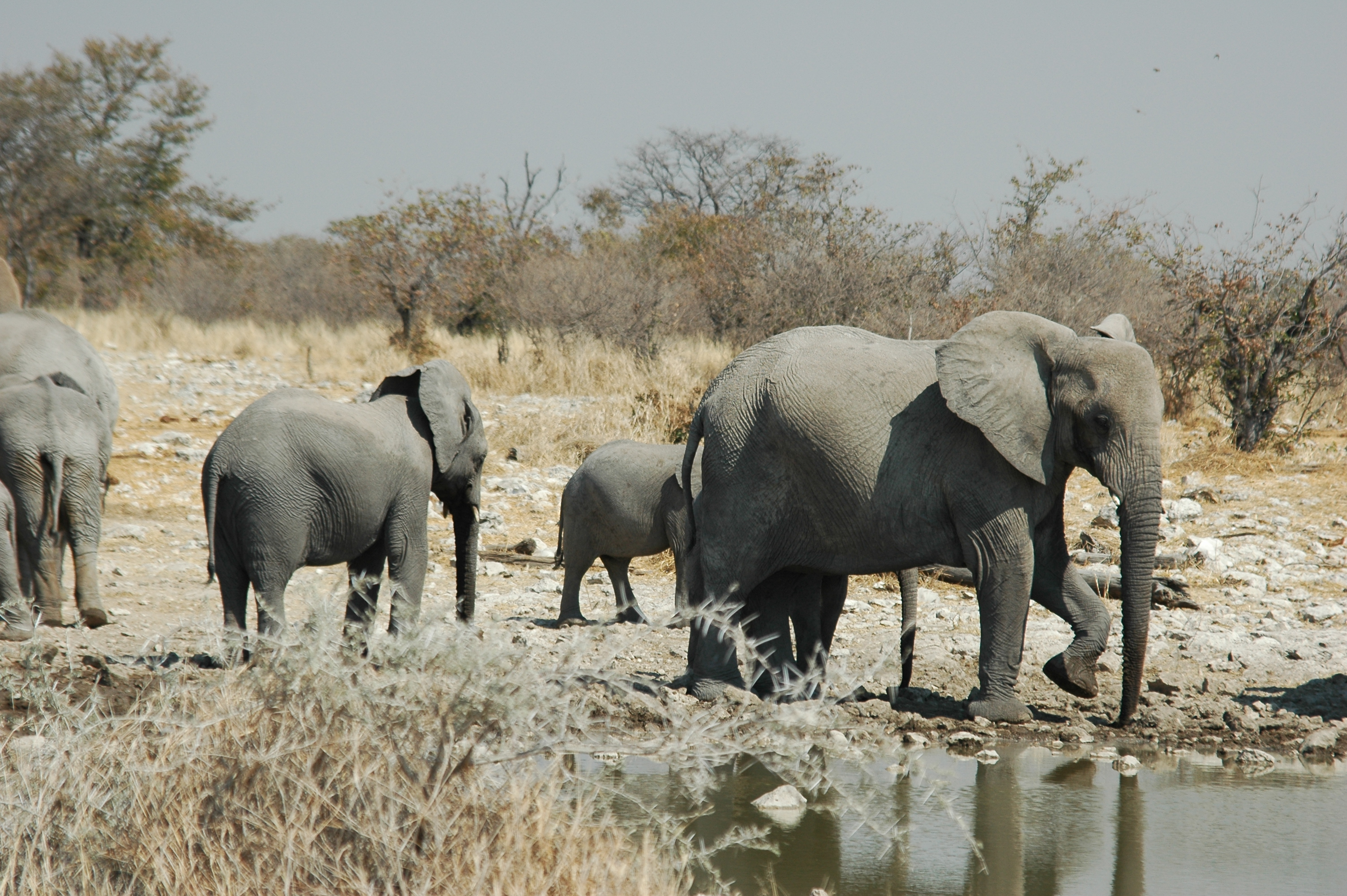 Namibie Etosha National Park Eléphant